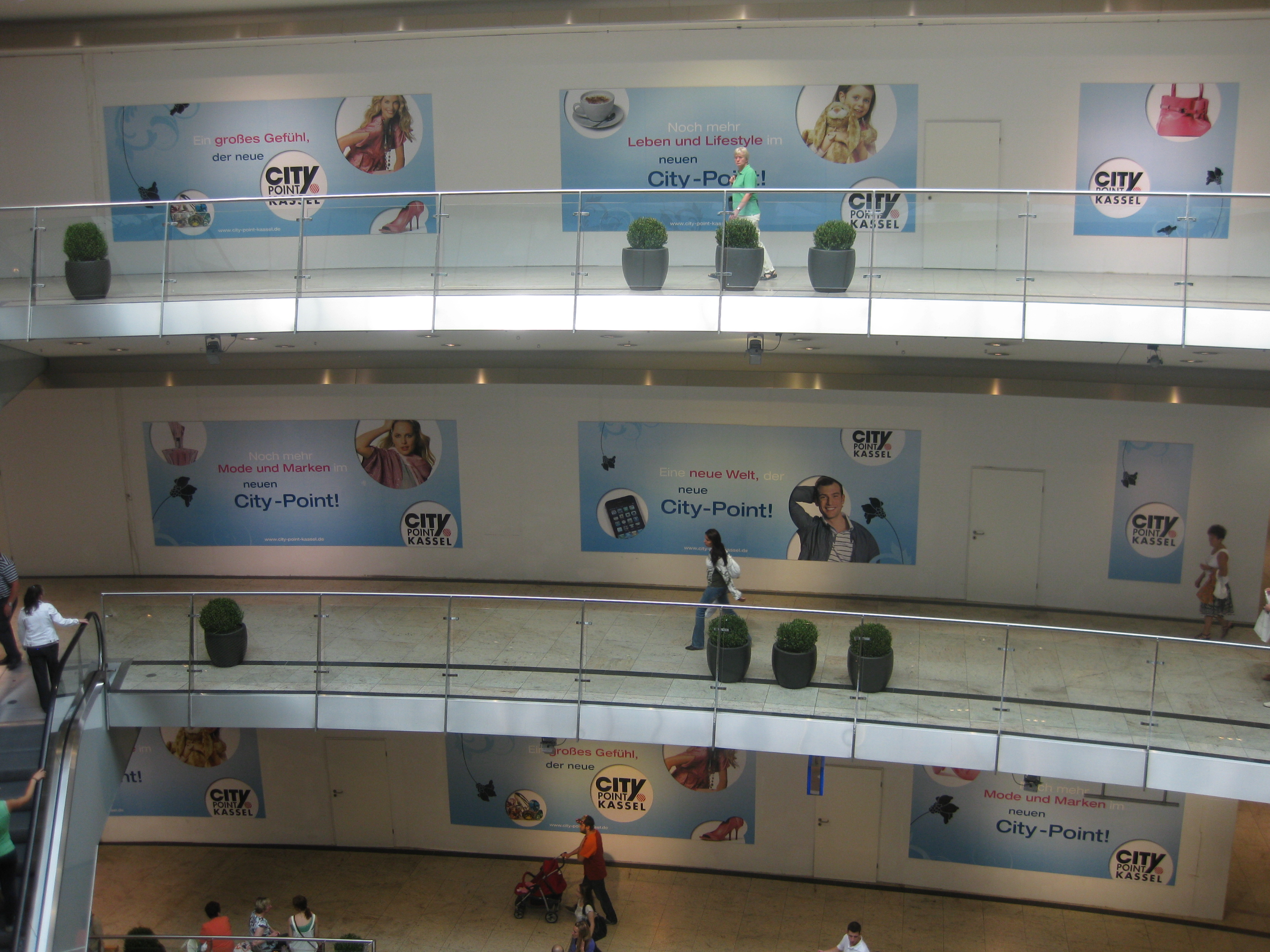 Das geschlossene Hertie Kaufhaus (August 2009) im Einkaufszentrum City-Point in Kassel ist durch Bretter abgedeckt. Früher war das ganze Gebäude ein Karstadt Kaufhaus. Es wurde abgerissen und im Neubau des Einkaufszentrums als Karstadt-Kompakt neu erröffnet.